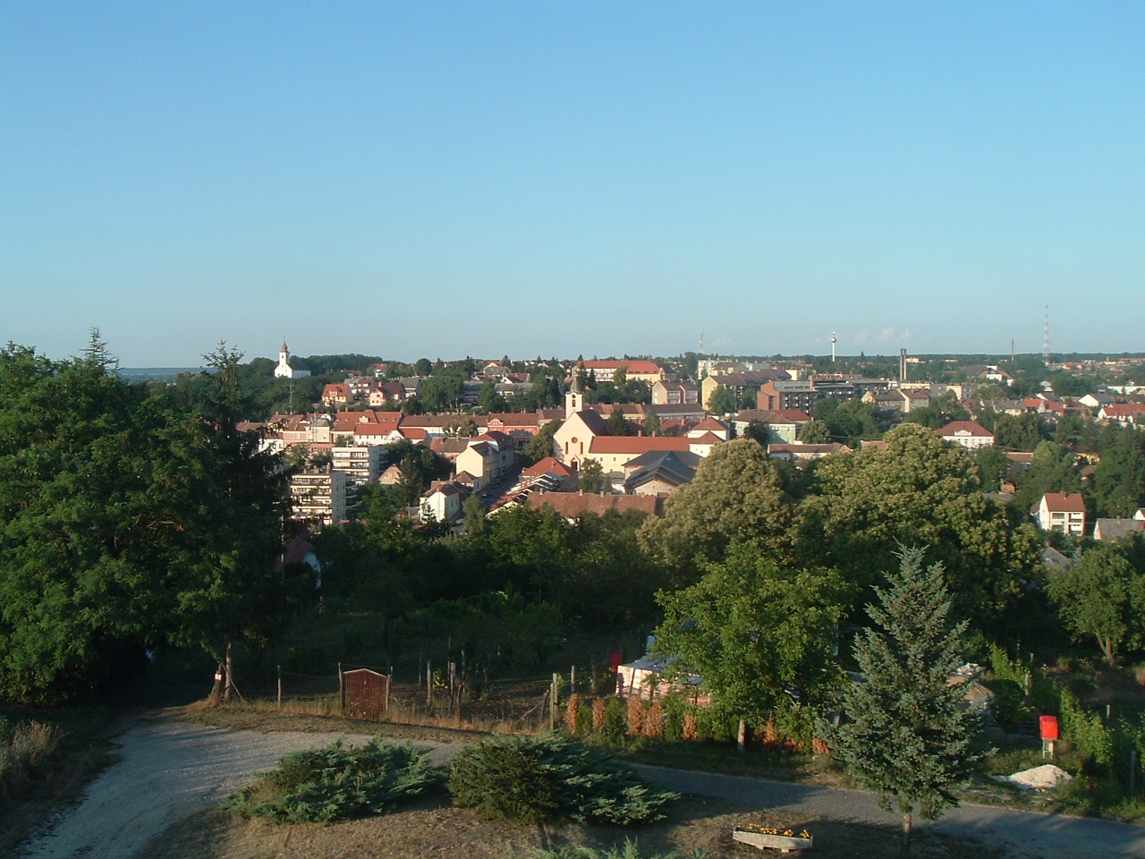 Vasvár, Hungary